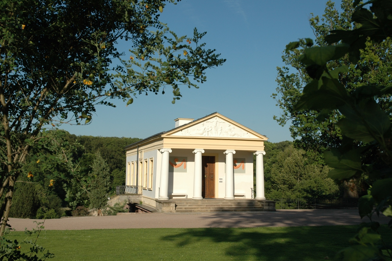 Römisches Haus in Weimar, Germany Die äußeren beiden Säulen sind wirklich leicht nach innen geneigt und sind keine „Stürzenden Linien“, d. h. nicht optisch verzerrt aufgenommen.